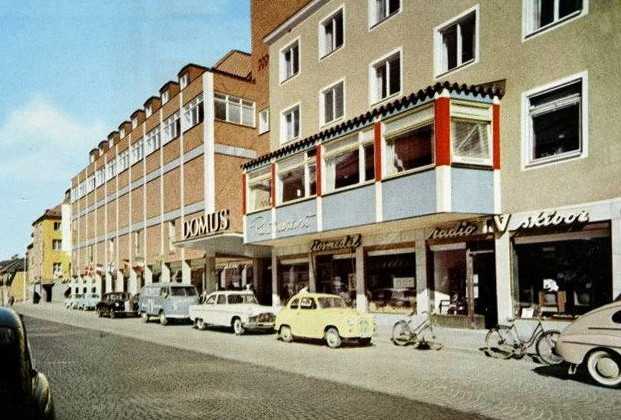 Domusvaruhuset vid Storgatan i Ludvika